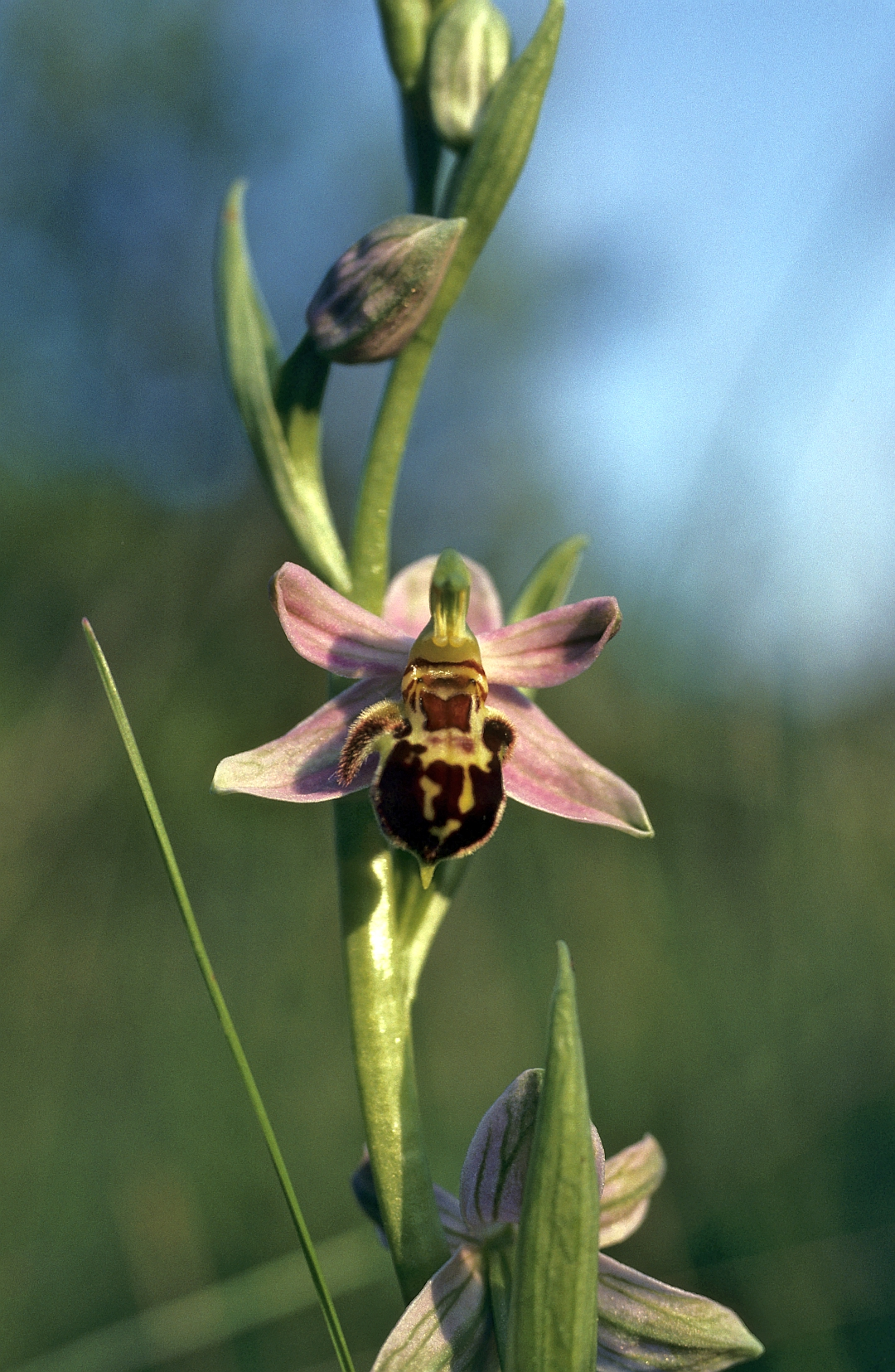 Bienen-Ragwurz (Ophrys apifera ssp friburgensis), Mosbach (Germany), 31.05.1994